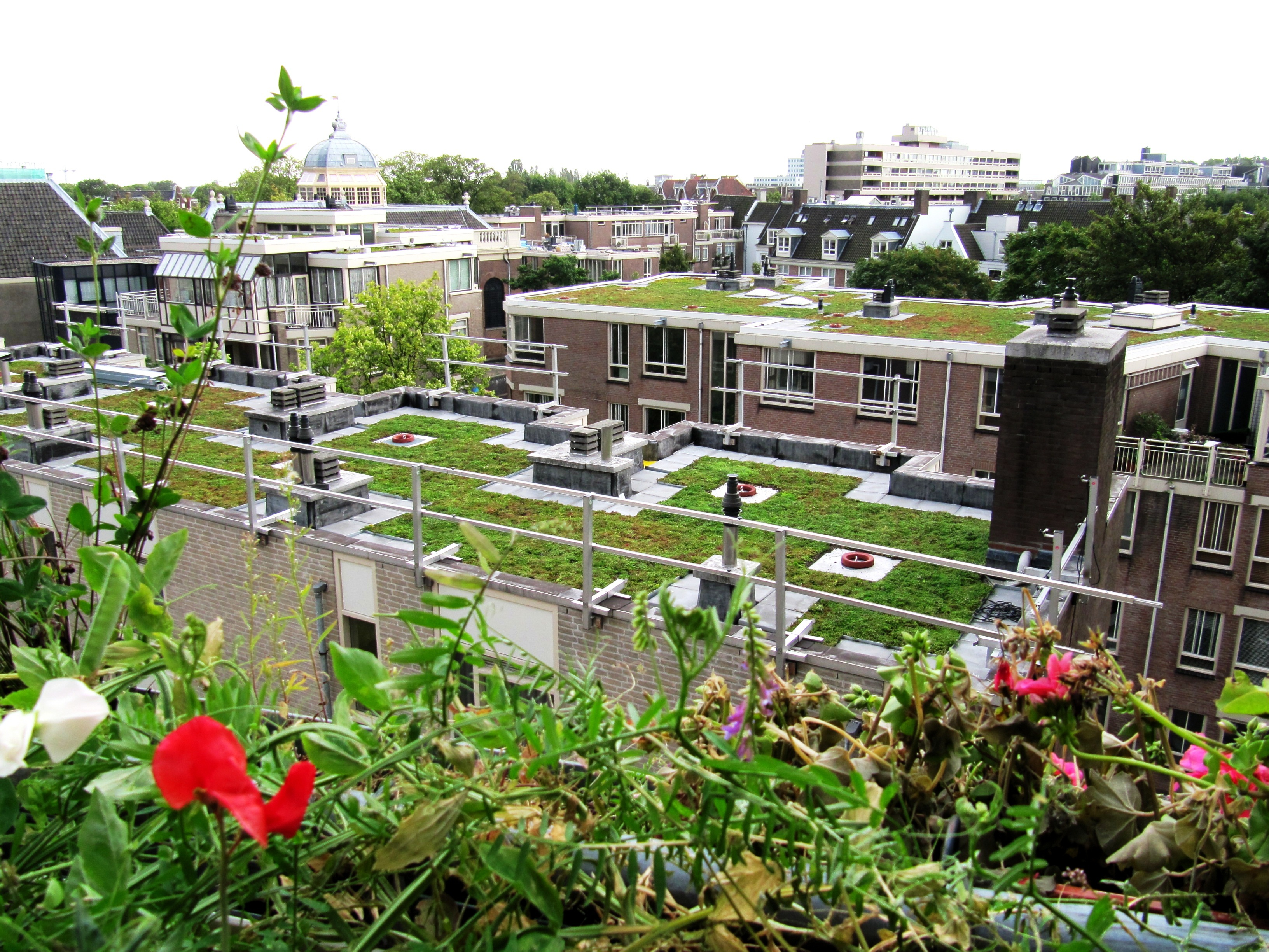 Groendak op wooncomplex De Halve Wereld